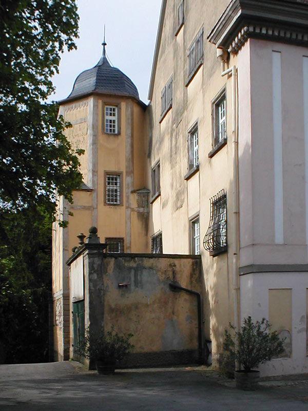 Spätmittelalterlicher Eckturm von Schloss Lehrensteinsfeld